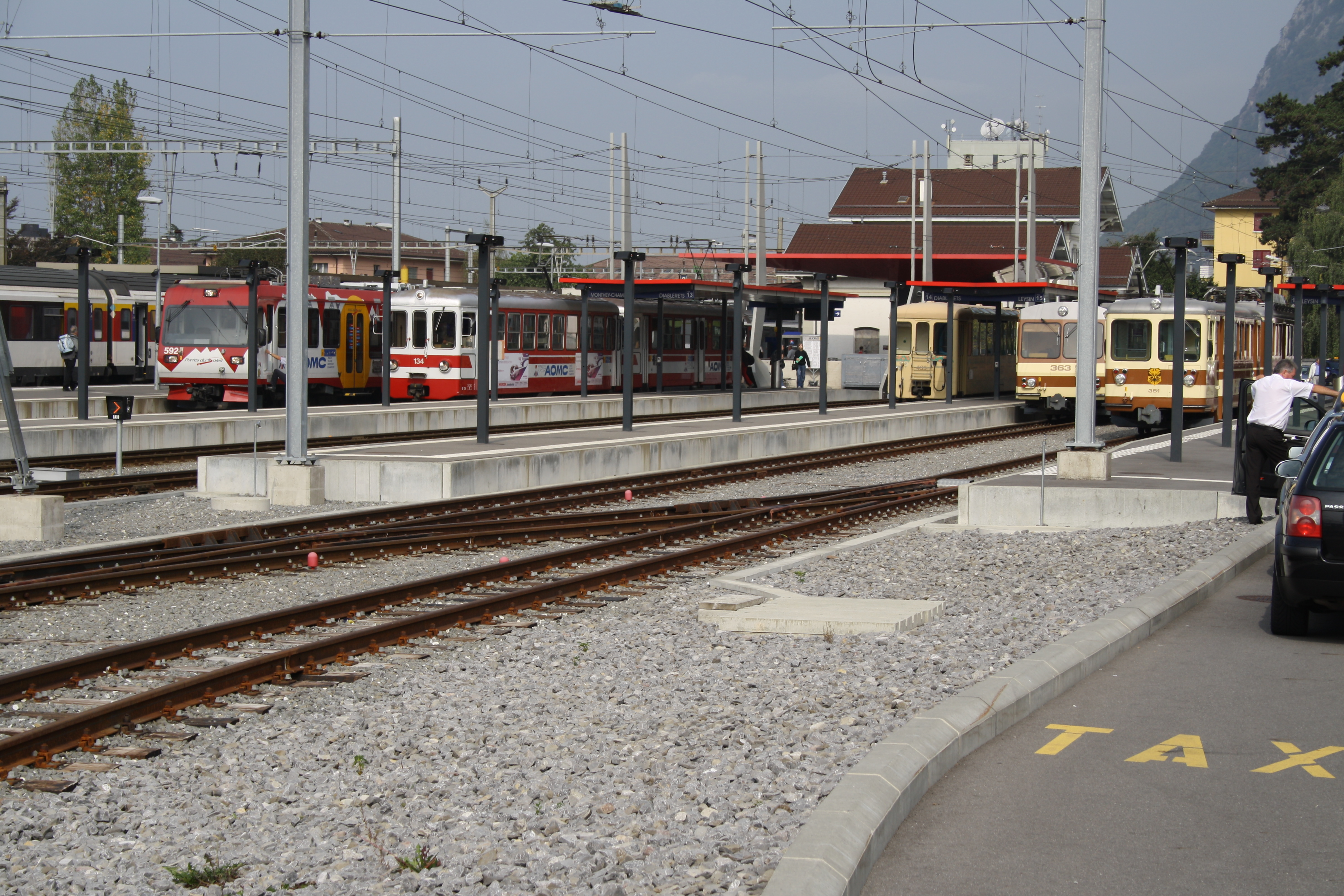 AOMC, AL und SBB im Bahnhof Aigle